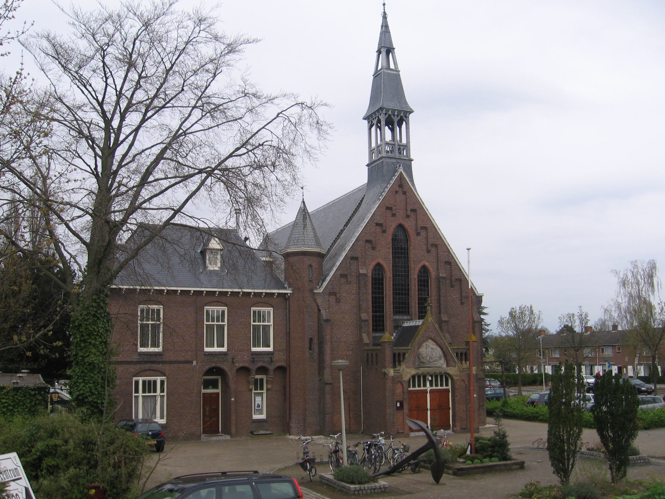 R.K. Willibrorduskerk, Dorpsdijk 234, Rhoon, Albrandswaard